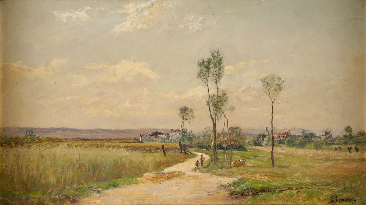 Ebene von Forez. Signiert. Öl auf Malkarton, 24 x 41 cm